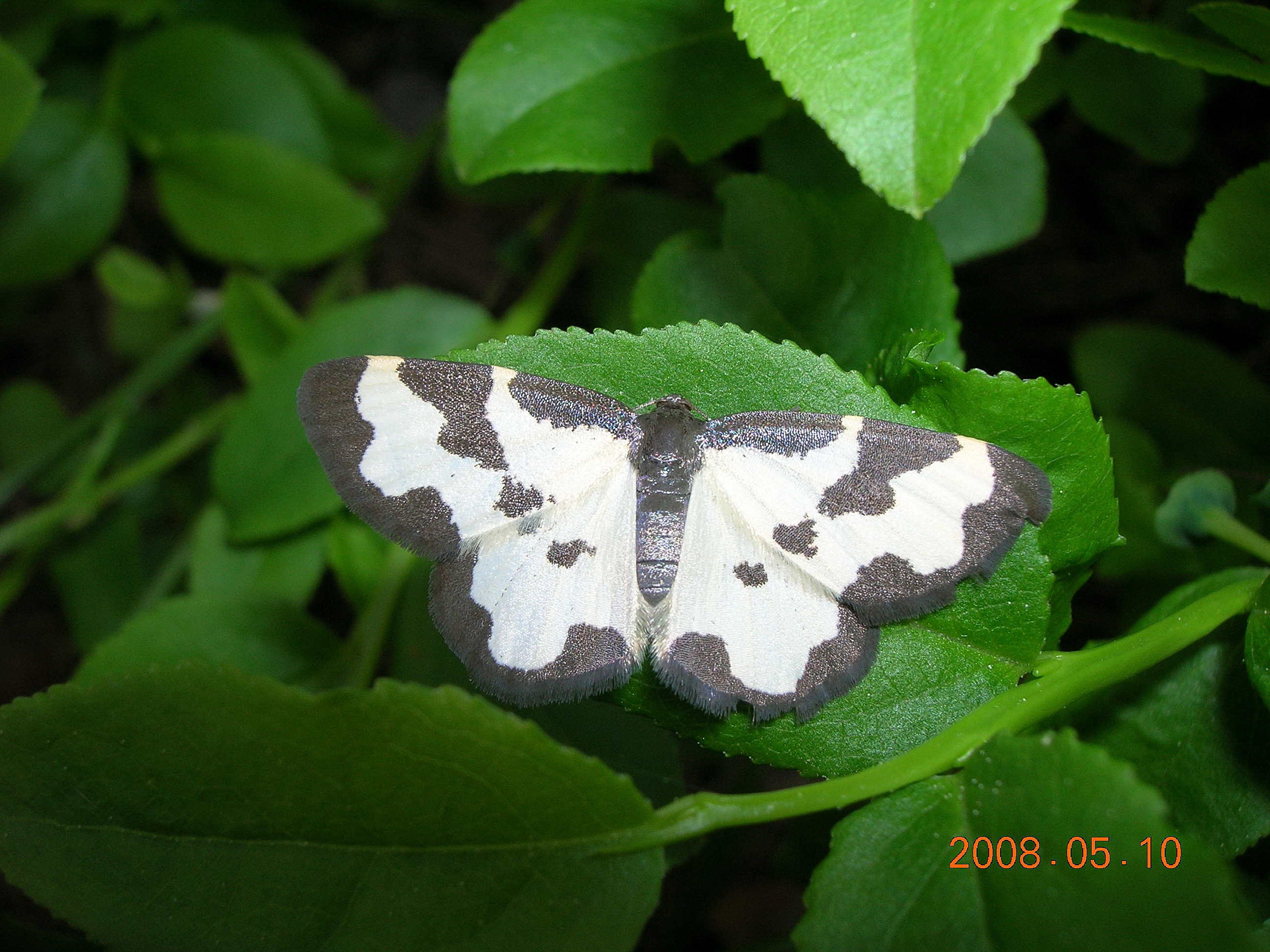 Plamiec nabuczak (Lomaspilis marginata), wierzchnia strona pokrywy skrzydeł. Mazowsze, Polska.